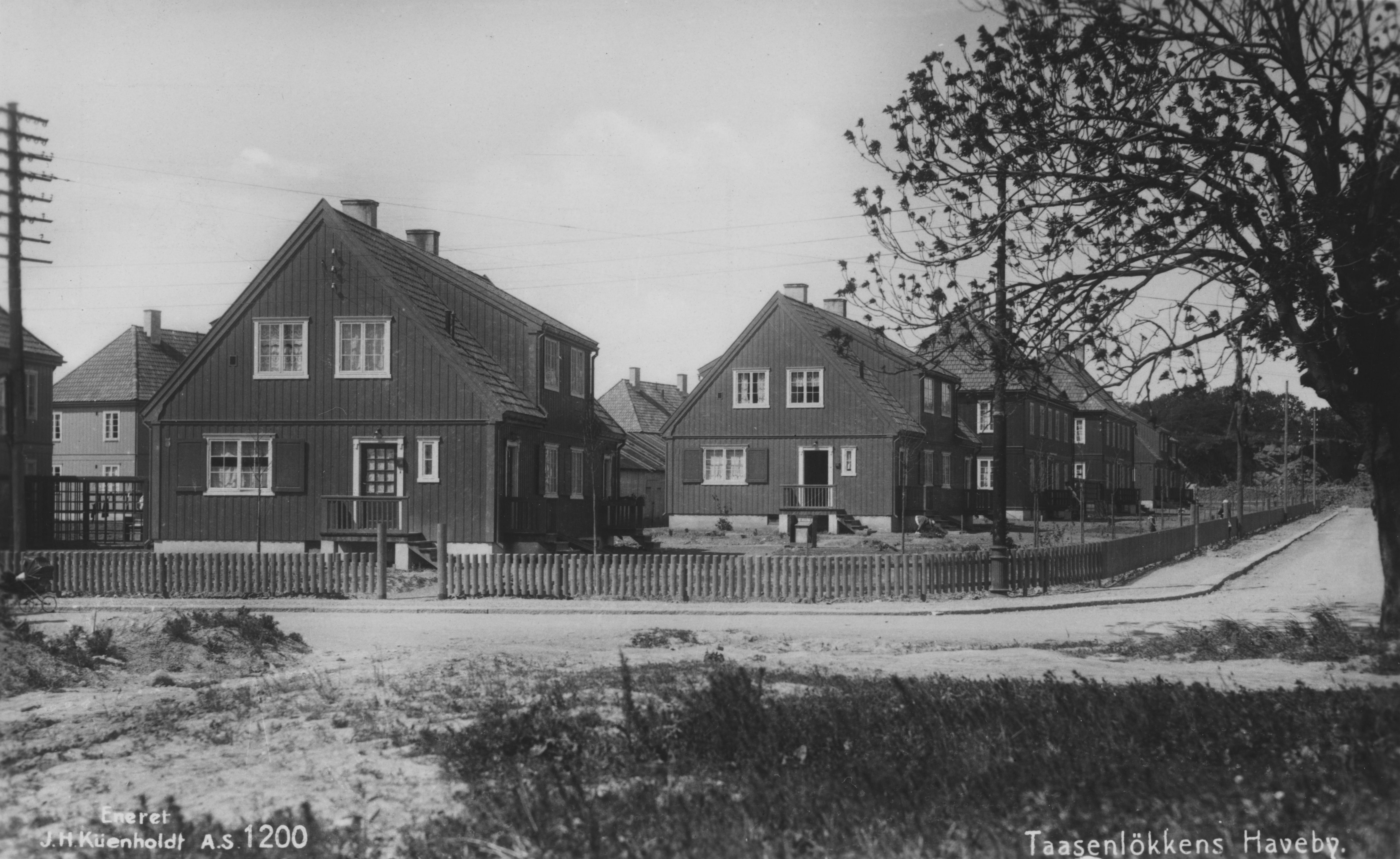 Bildet er hentet fra Nasjonalbibliotekets bildesamling Tåsen, Oslo, Oslo